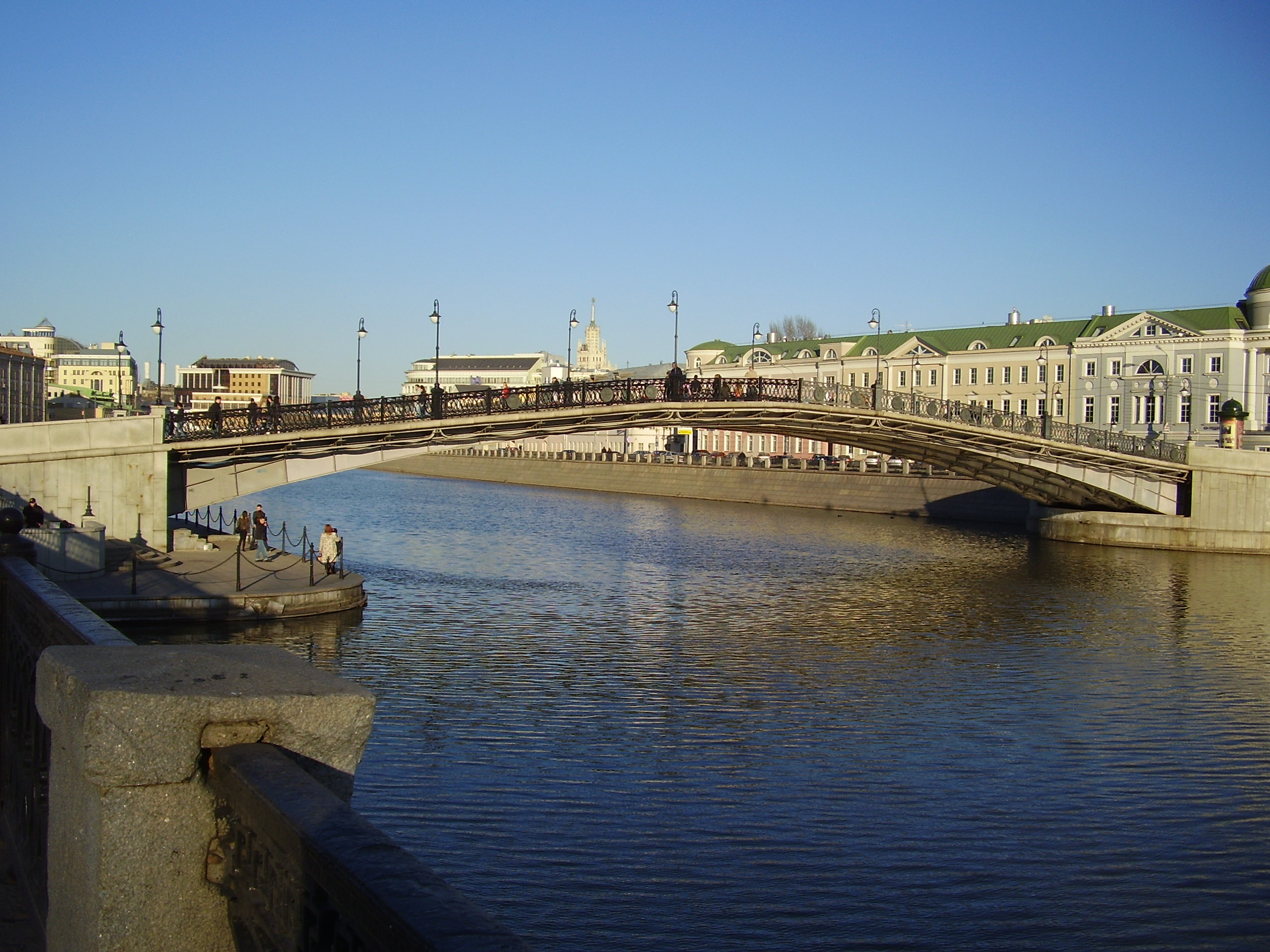 Luzhkov Bridge over Vodootvodny Canal in Moscow